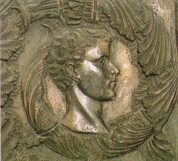 FILARETE Bronze door Bronze Basilica di San Pietro, Vatican